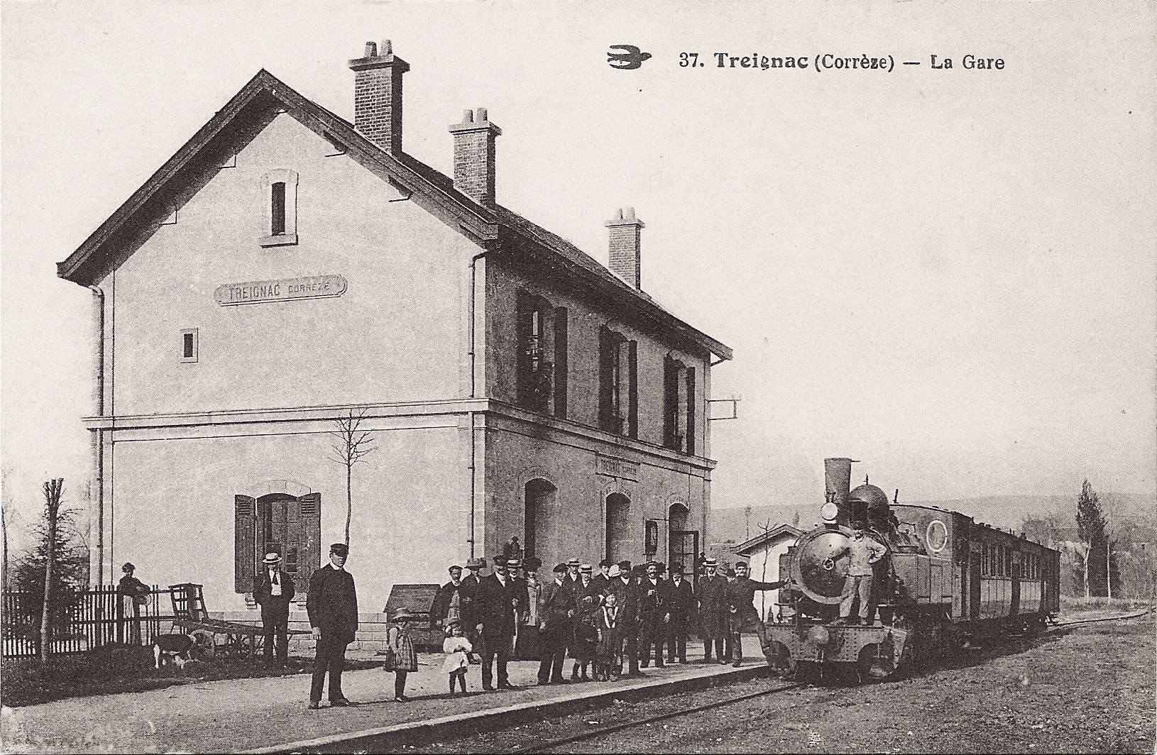 Carte postale ancienne d'un train du PO-Corrèze en gare de Treignac (Corrèze). Éditeur L'hirondelle à Paris